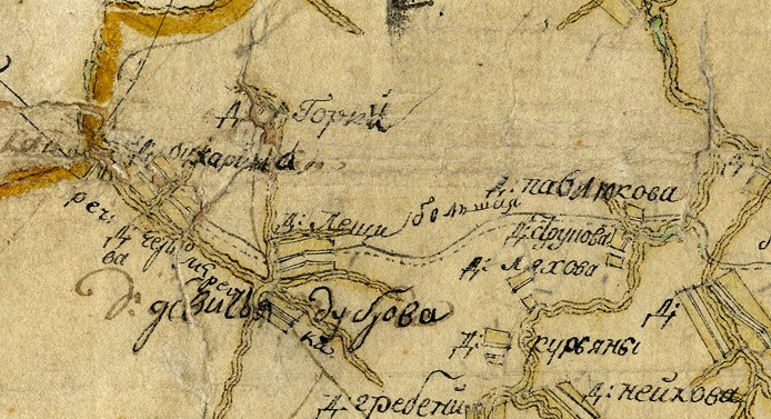 План генерального межевания Смоленской губернии 1780-1792 гг. Участок карты в районе Д. Бухарино